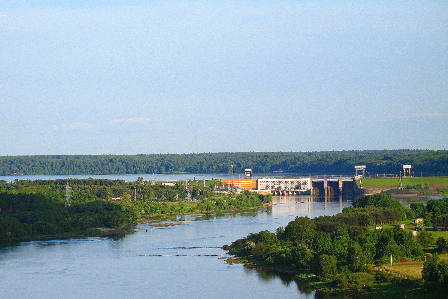 Kauno hidroelektrinė.